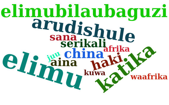 Kiswahili: Jalada hii ni Wingu wa maneno (tag cloud au word cloud)